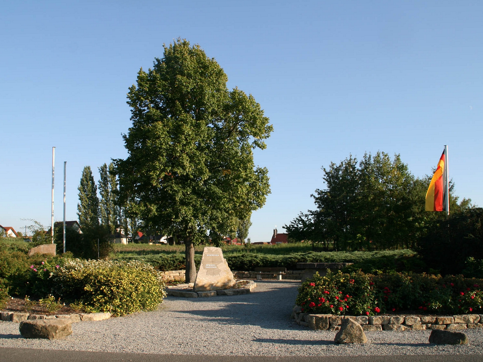 Geografischer Mittelpunkt Deutschlands in Niederdorla